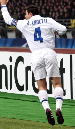 Zanetti col braccio alzato